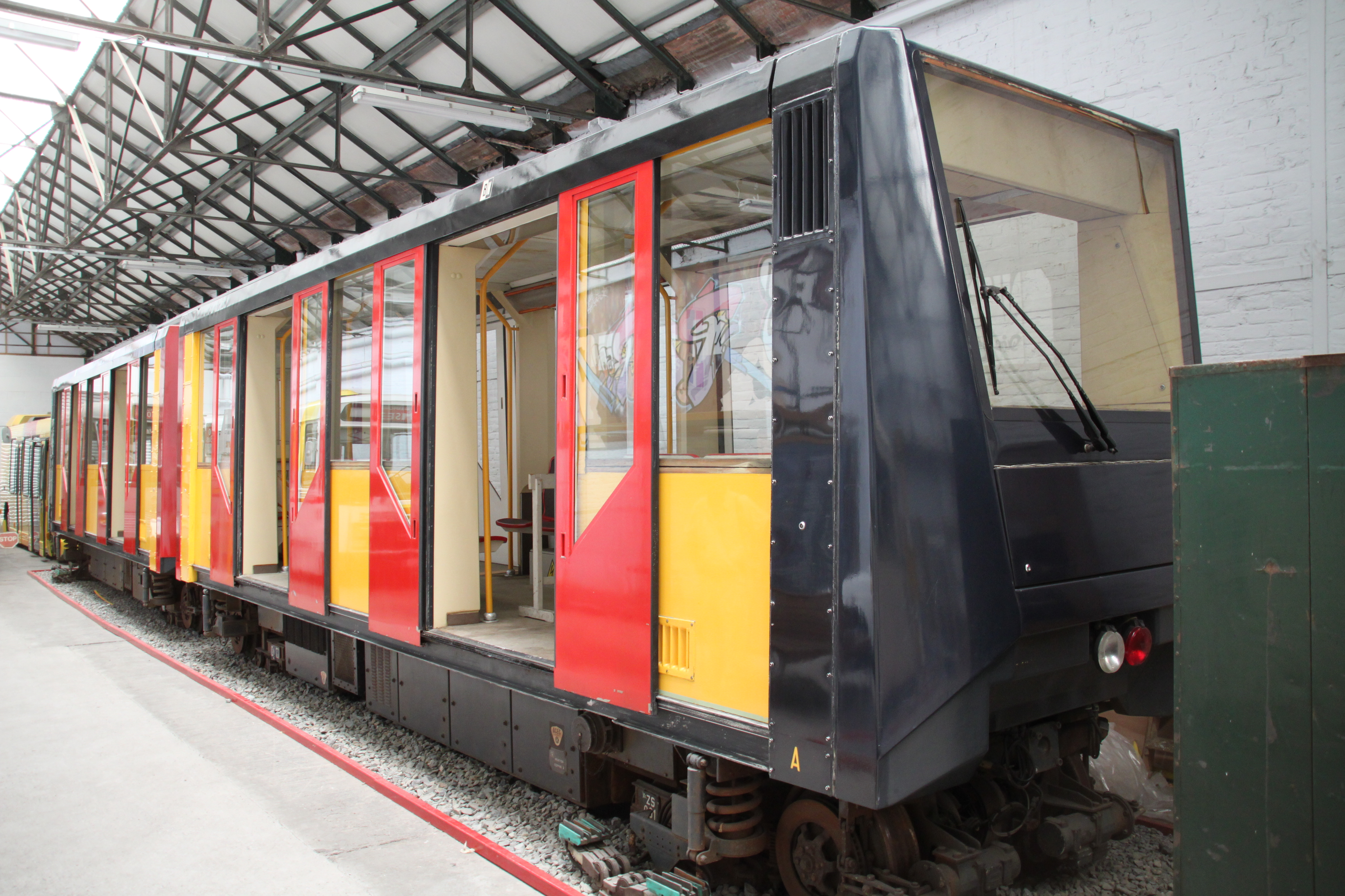 Voorzijde van de TAU-trein (prototype) in het Musée des transports en commun (Liège)